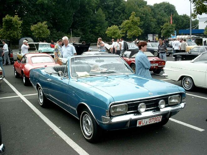 Bildbeschreibung: Opel Rekord C - Cabrio-Umbau von der Firma Deutsch Fotograf/Zeichner: Nobsy Datum: 16.07.2002 - Opel-Treff Würzburg 2002 andere Versionen: Keine vorhanden